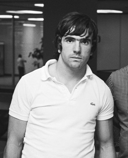 Arrivée de l'Athletic Bilbao à l'aéroport d'Amsterdam-Schiphol. Dani. Photographie par Bert Verhoeff / Anefo.